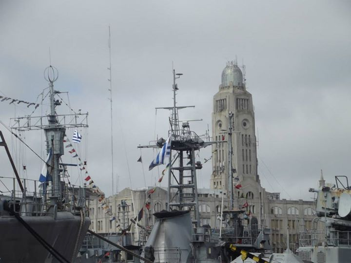 Puerto de Montevideo, ubicada en Departamento de Montevideo, Uruguay